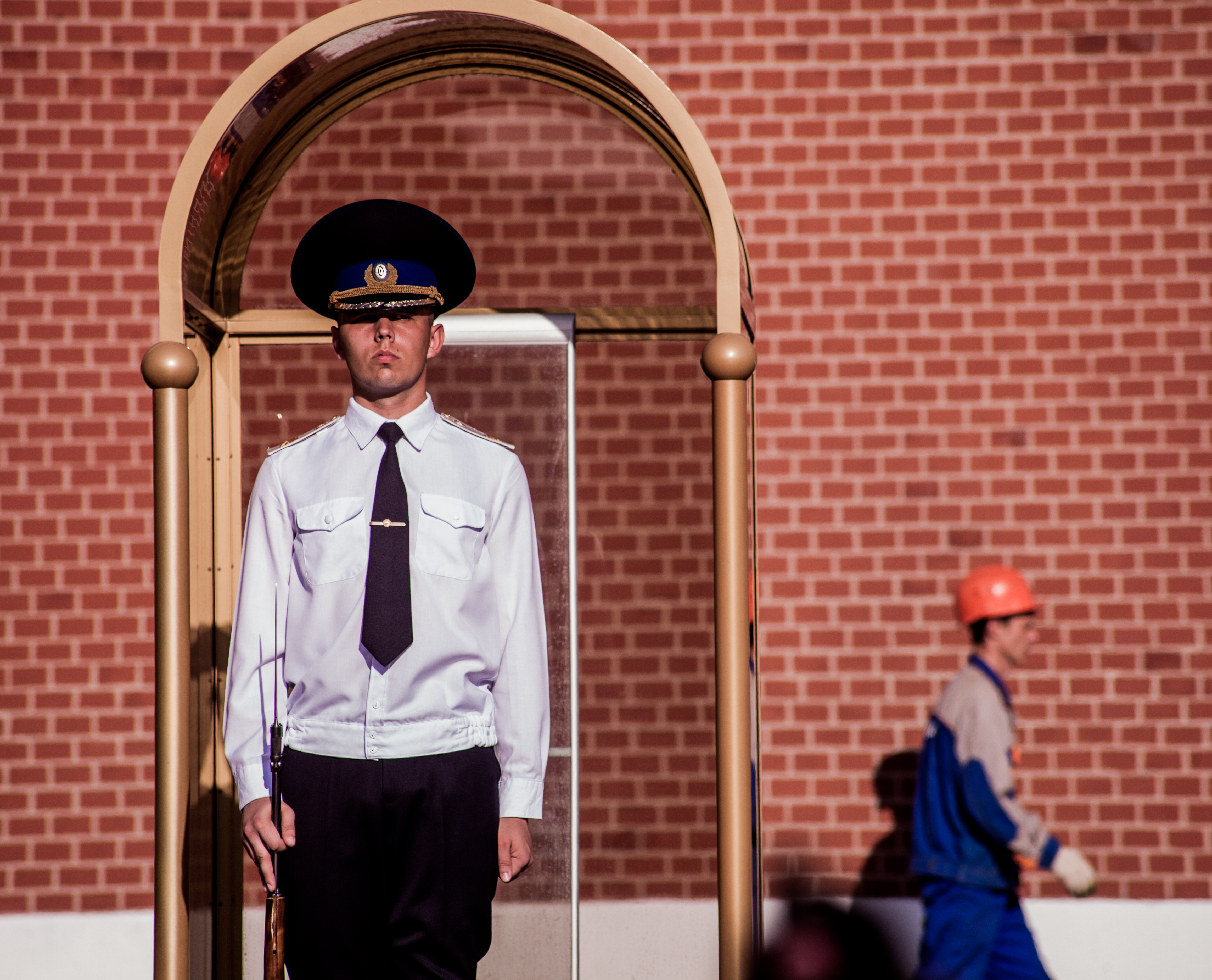 Моги́ла Неизве́стного Солда́та